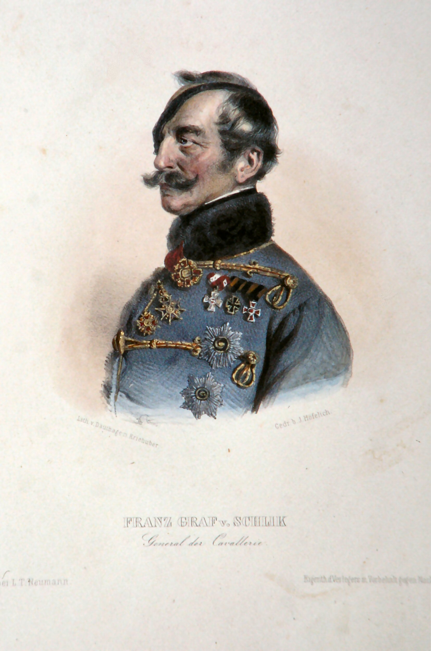 Franz von Schlik (1789-1882), Graf von Bassano und Weisskirchen, General der Kavallerie, Kommandeur des Maria-Teresien-Ordens. Lithographie von Adolf Dauthage, ca.1848. Nach Kriehuber.